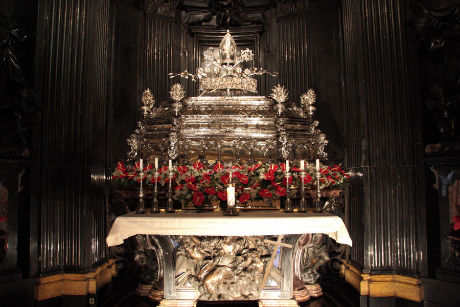 L'urna all'interno dello scurolo della Basilica di San Gaudenzio a Novara, in cui sono conservate le spoglie del santo.